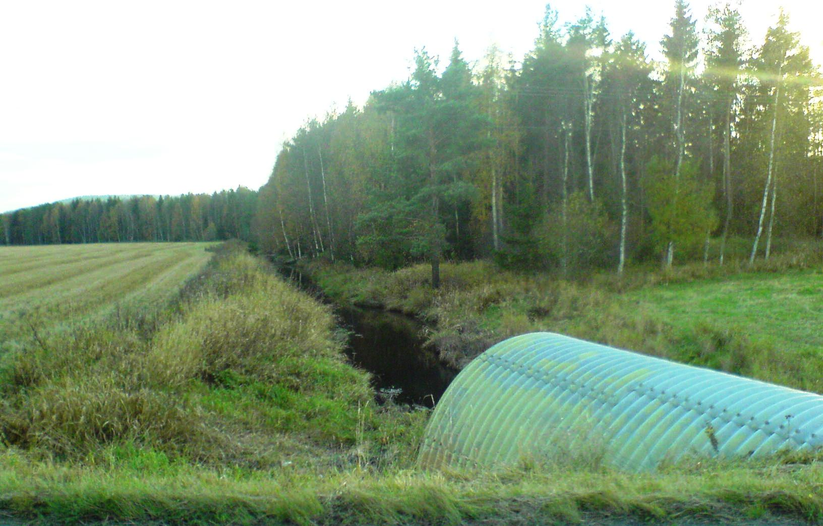 Gørrelva - sett fra Høgbrua.